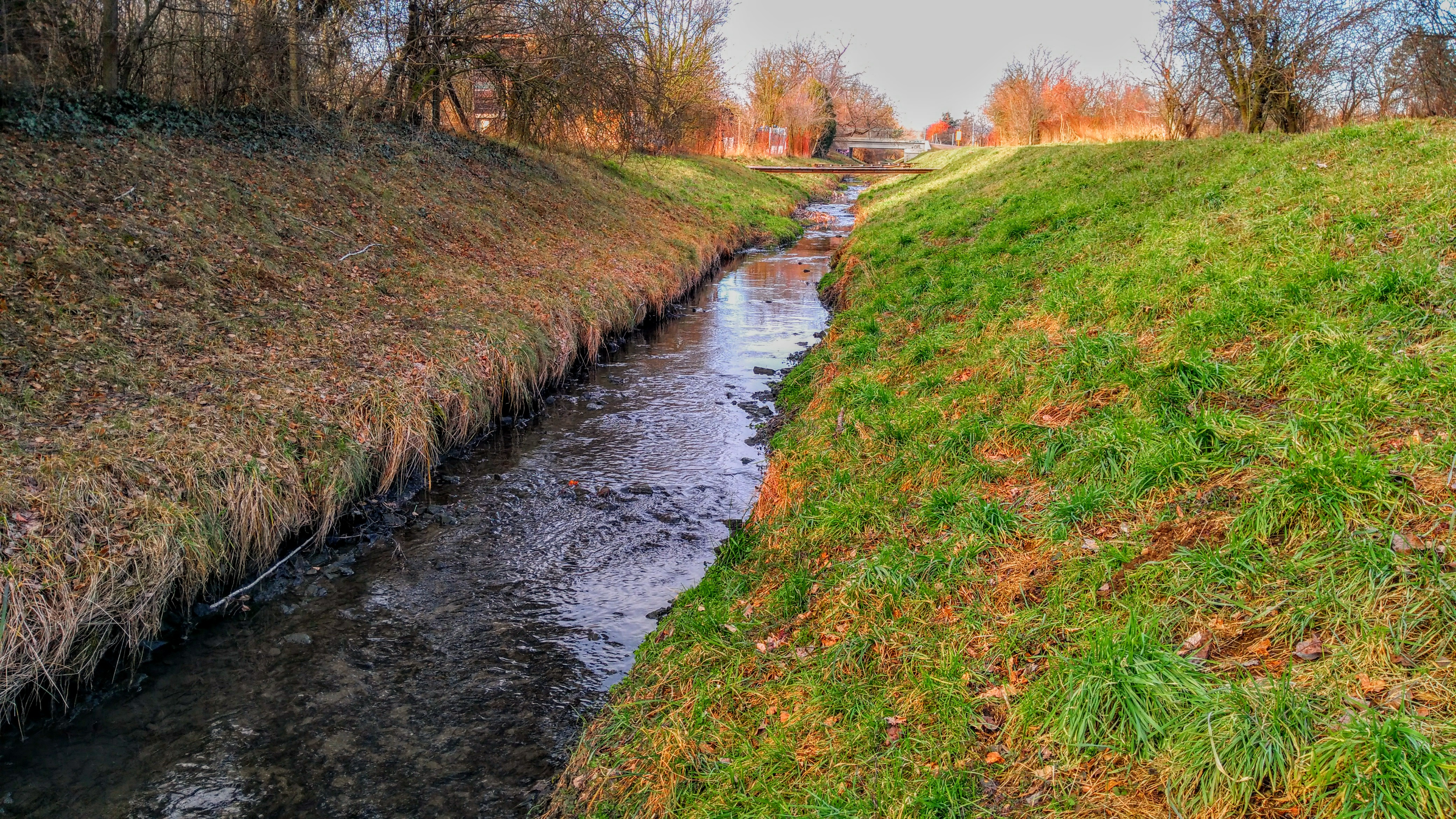 Potok.